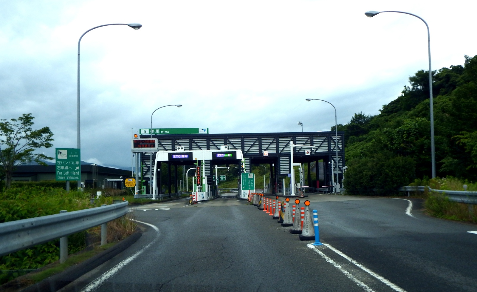 美馬インターチェンジ入口